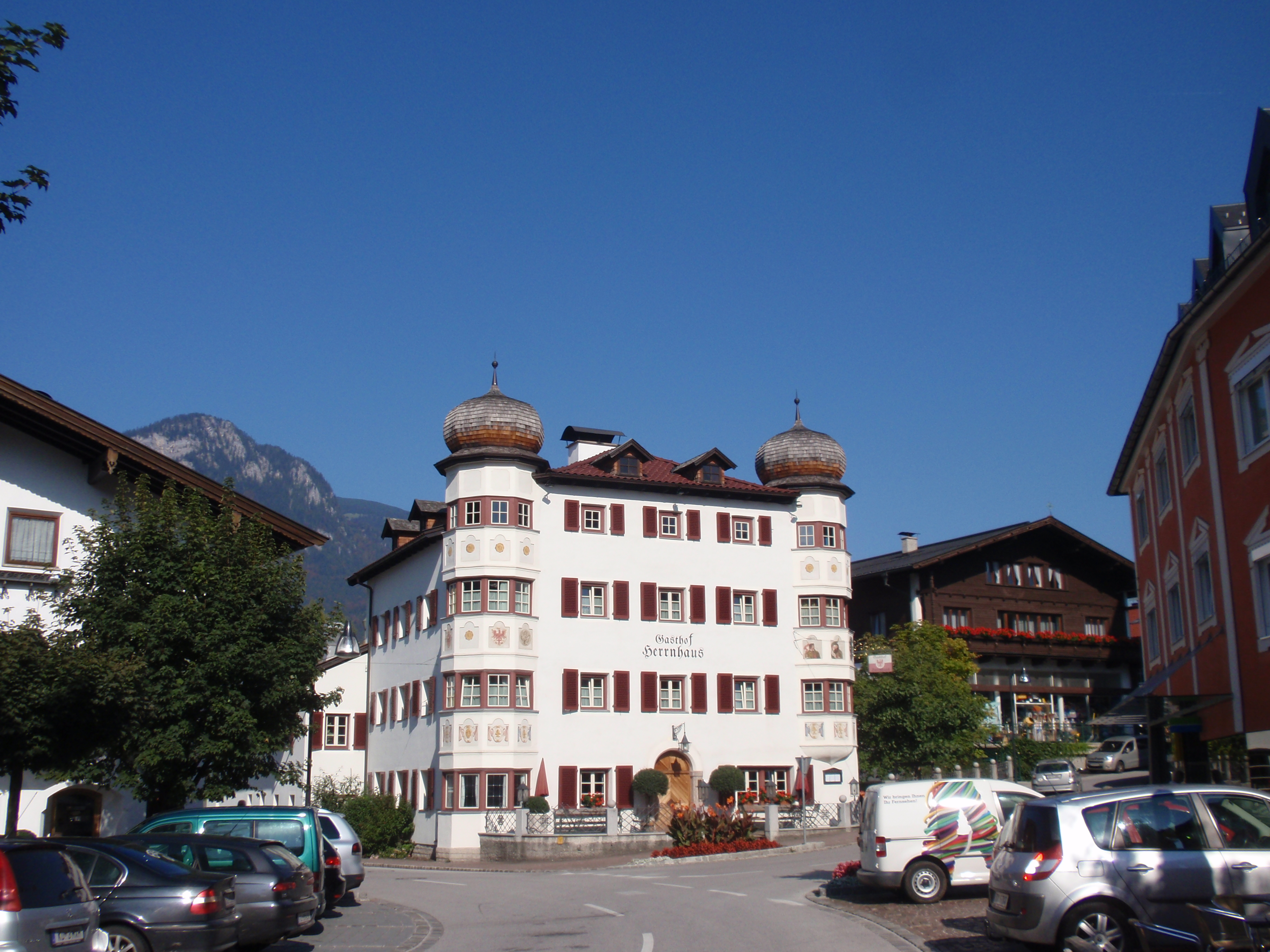 Ortszentrum von Brixlegg mit Herrnhaus (Grasegg) This media shows the remarkable cultural object in the Austrian state of Tyrol listed by the Tyrolean Art Cadastre with the ID 2554. (on tirisMaps, pdf, more images on Commons)